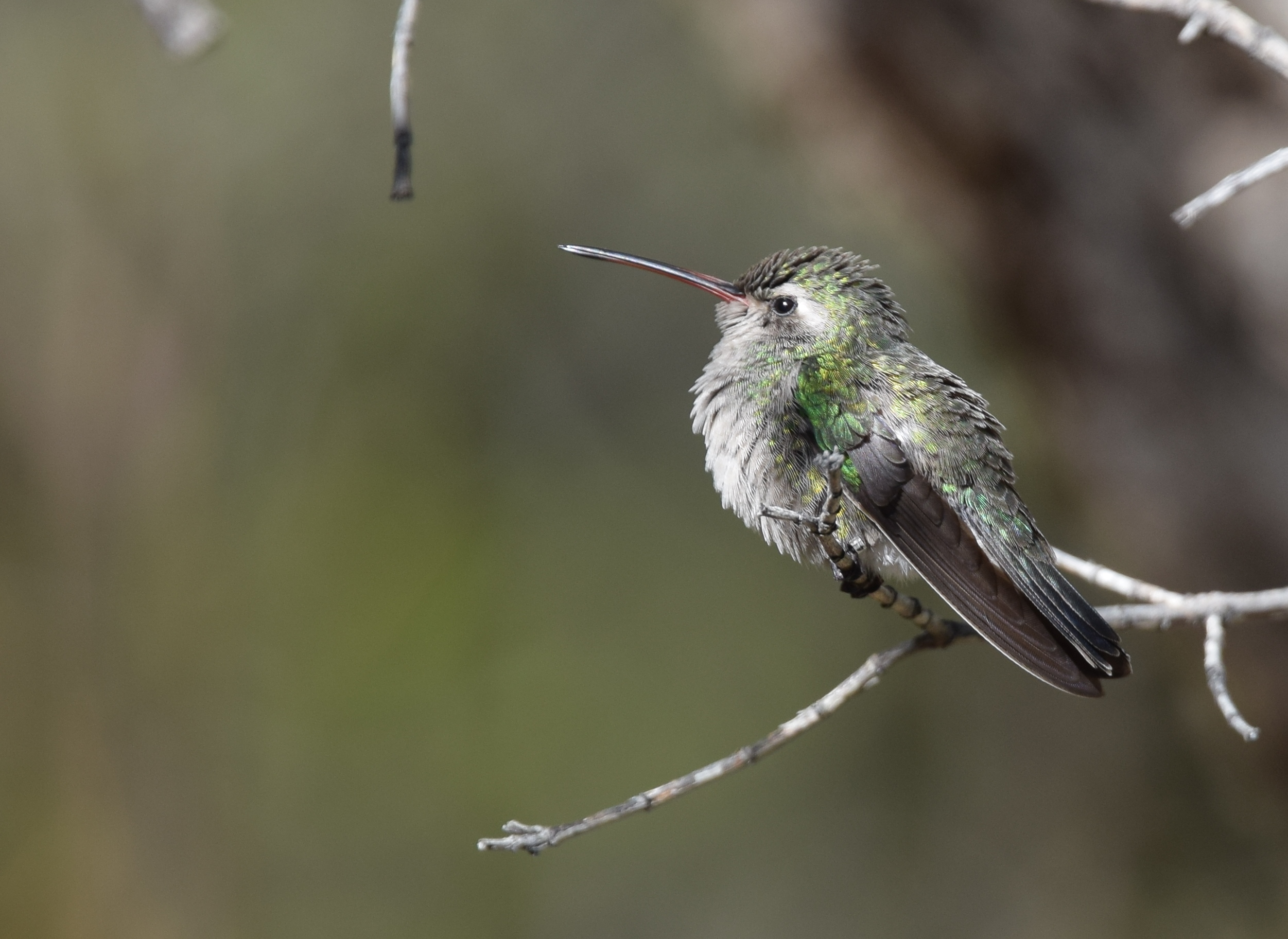 Day 4 4/1/17 Arizona